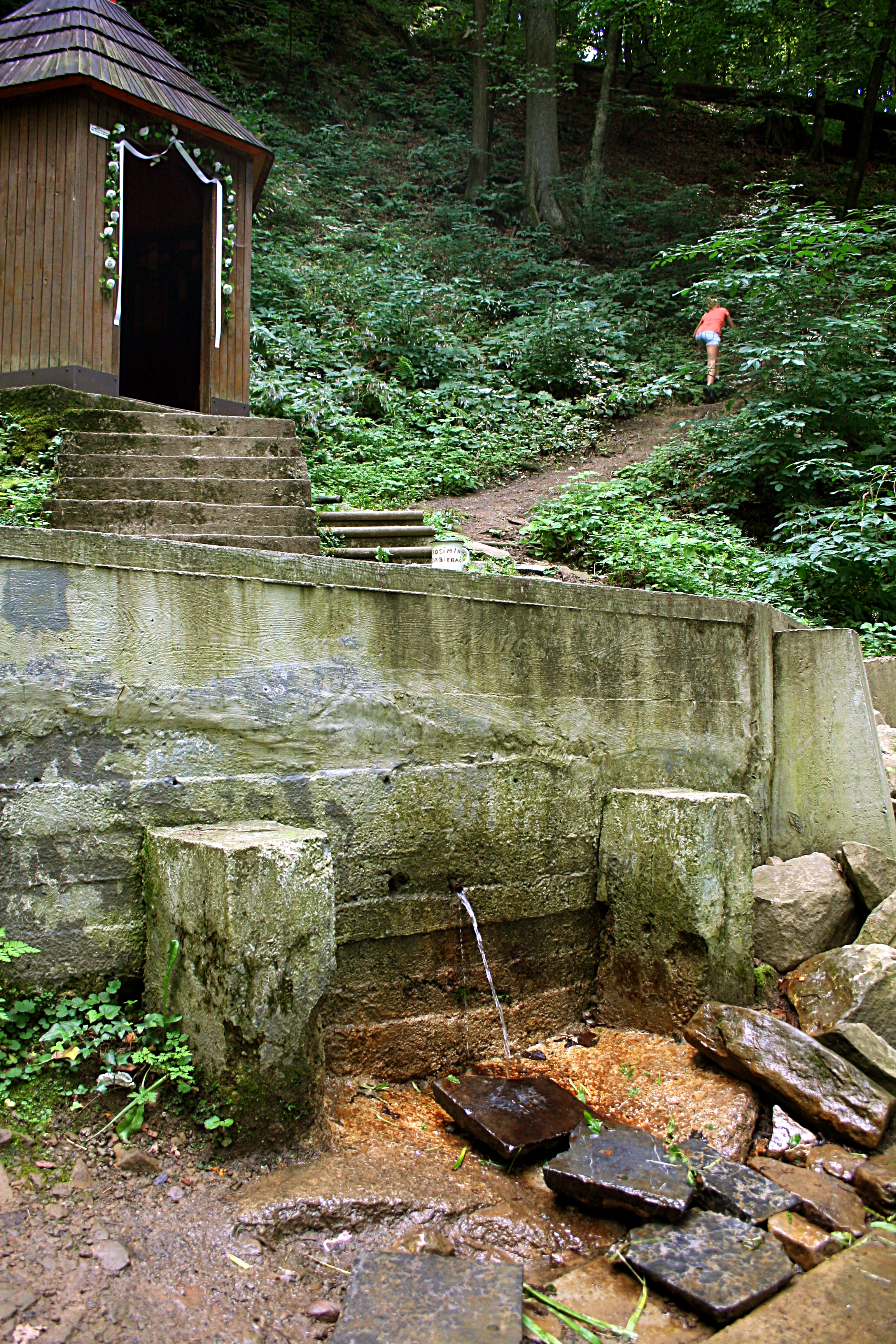 Kaplica i źródło św. Jana z Dukli w "Rezerwat 1000-lecia".